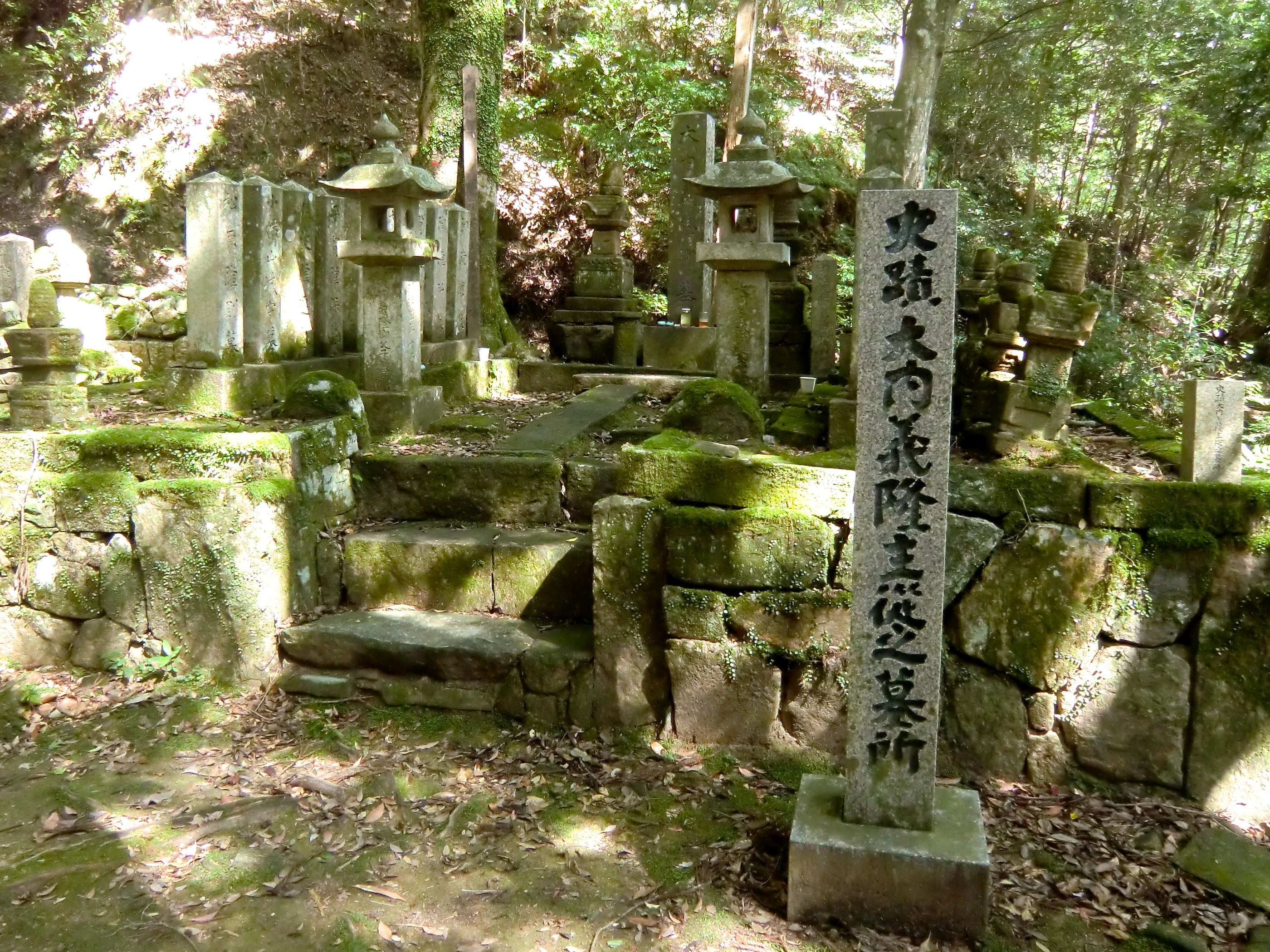 大寧寺の大内義隆主従の墓所（山口県長門市）